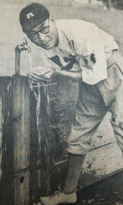 八十川胖